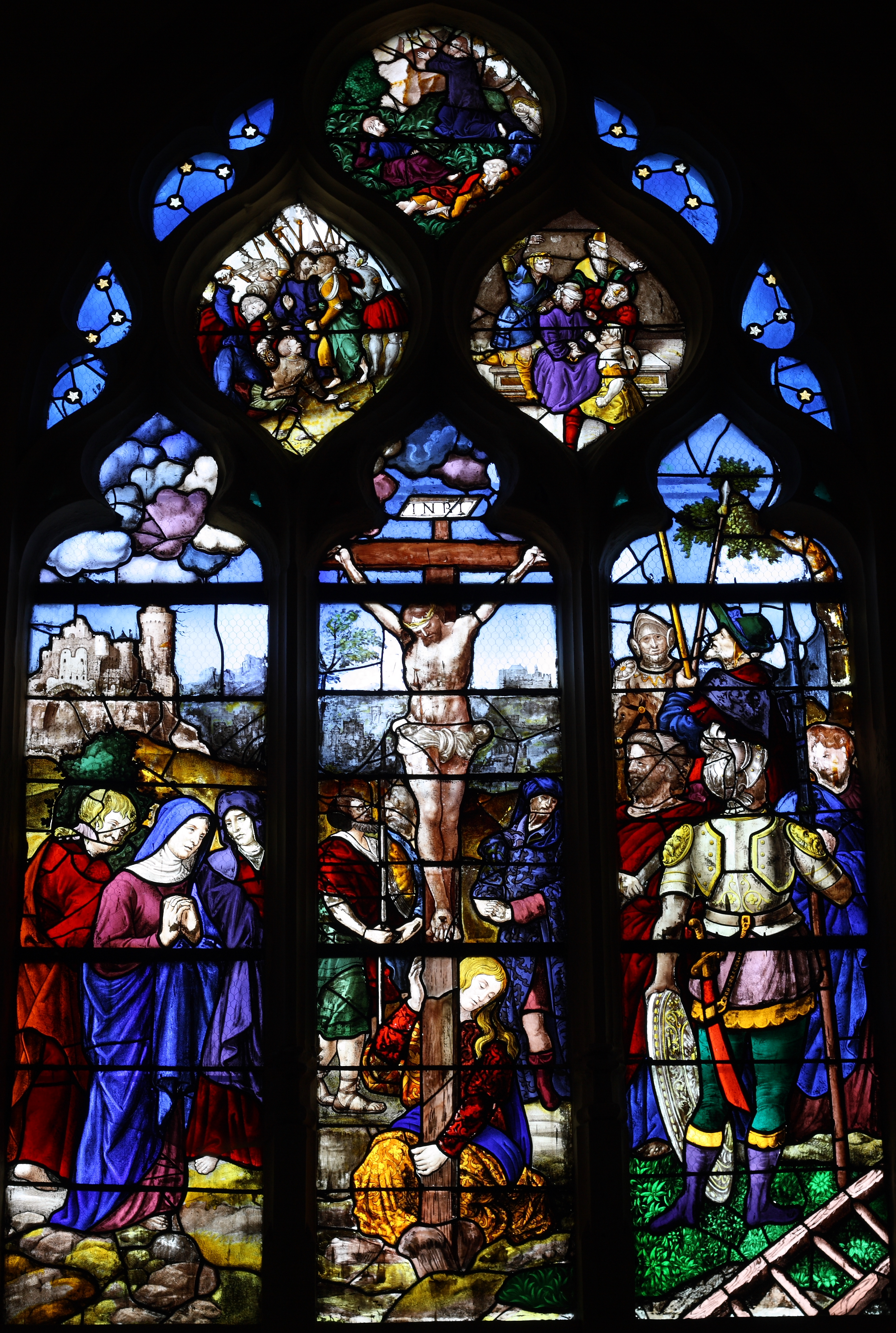 Katholische Pfarrkirche Saint-Martin in Triel-sur-Seine, einer Gemeinde im Département Yvelines (Île-de-France), Bleiglasfenster im Langhaus aus dem 16. Jahrhundert, Darstellung: Kreuzigung Christi